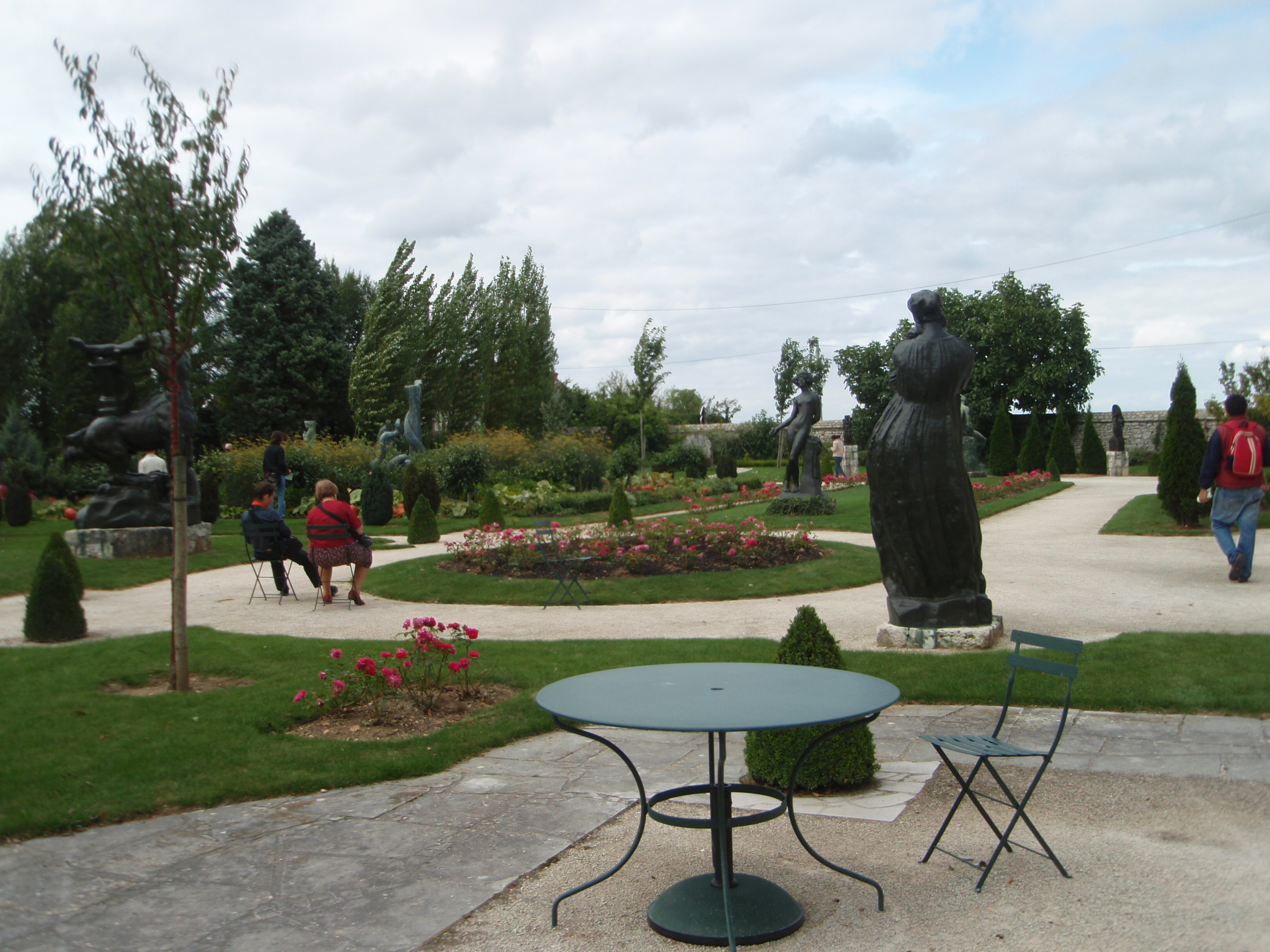 Jardin musée Antoine Bourdelle Egreville prés de Paris vue générale du jardin en août 2008.